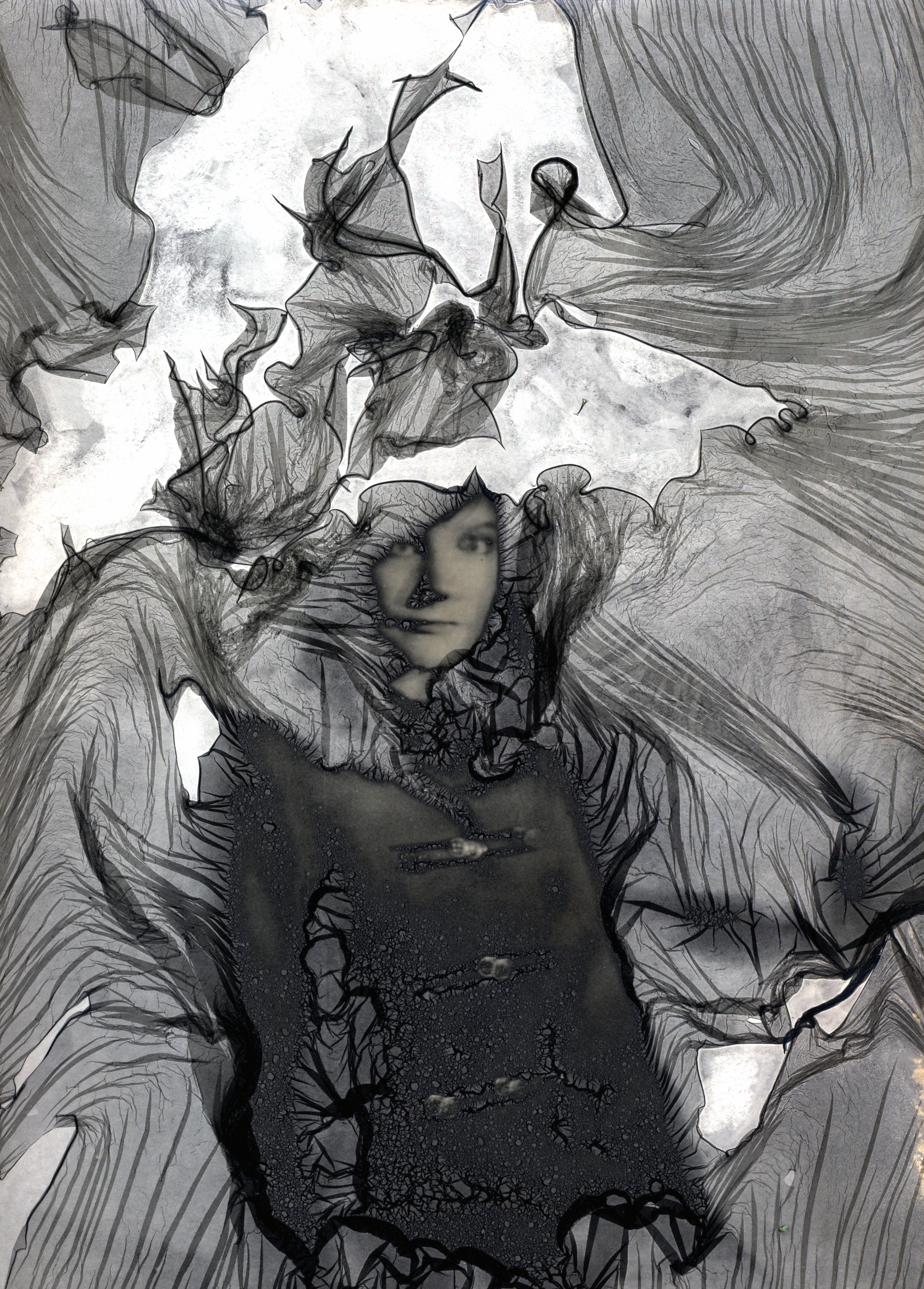 self portrait